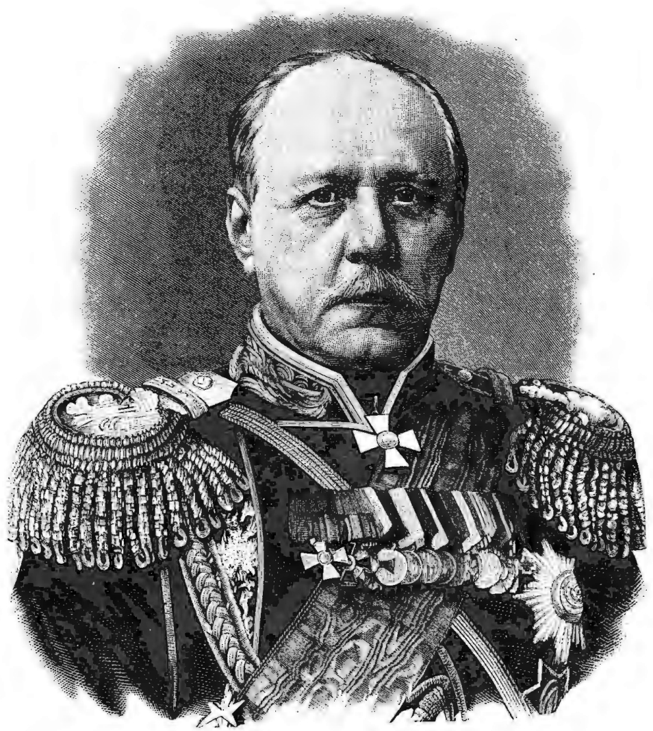 Шувалов Павел Андреевич, генерал-губернатор Варшавы